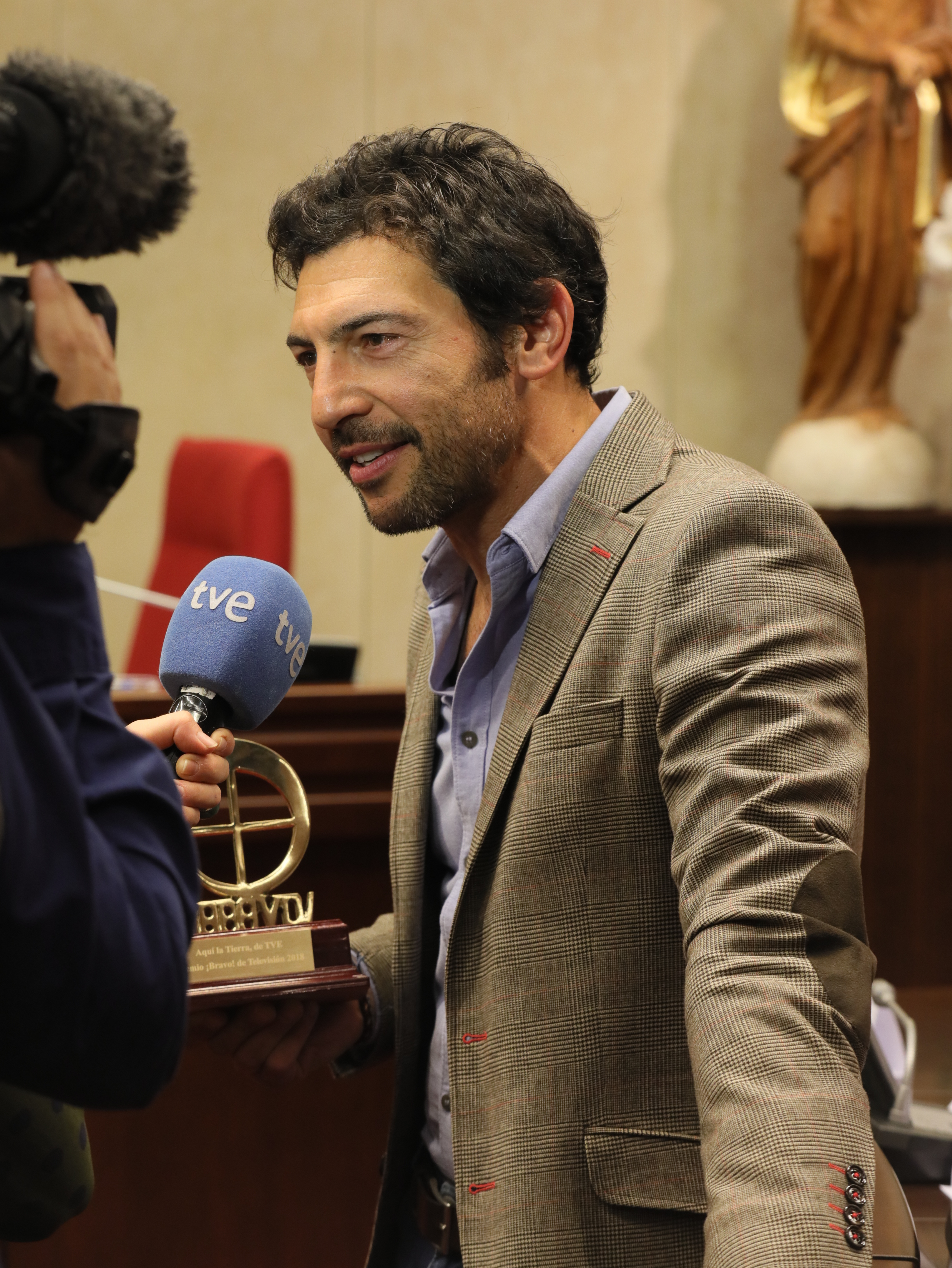 Entrega de los Premios ¡Bravo! 2018